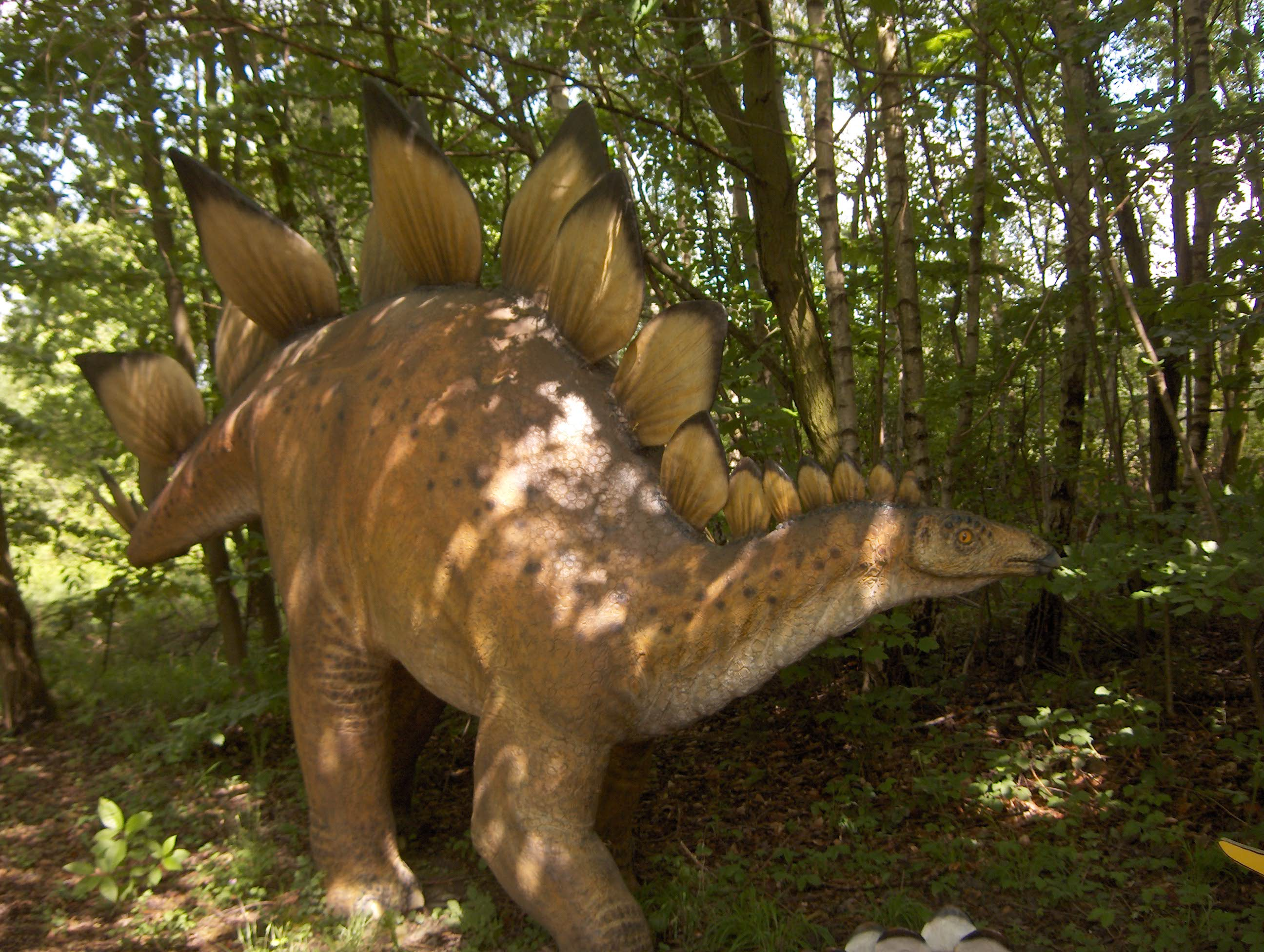 Modell eines Stegosaurus im Dino-Park Münchehagen (Niedersachsen)